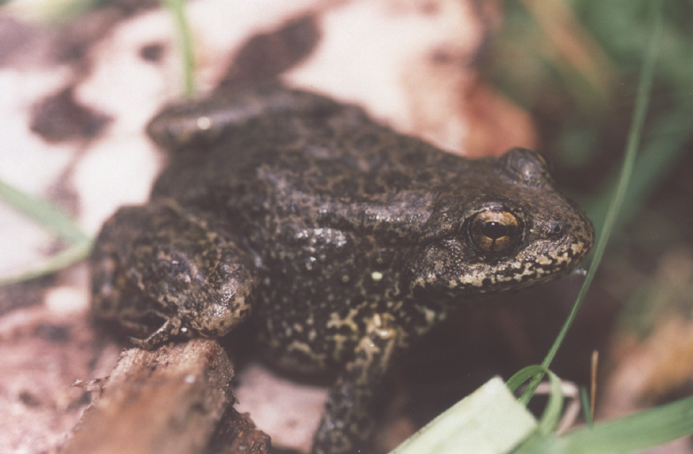 Rana sierrae